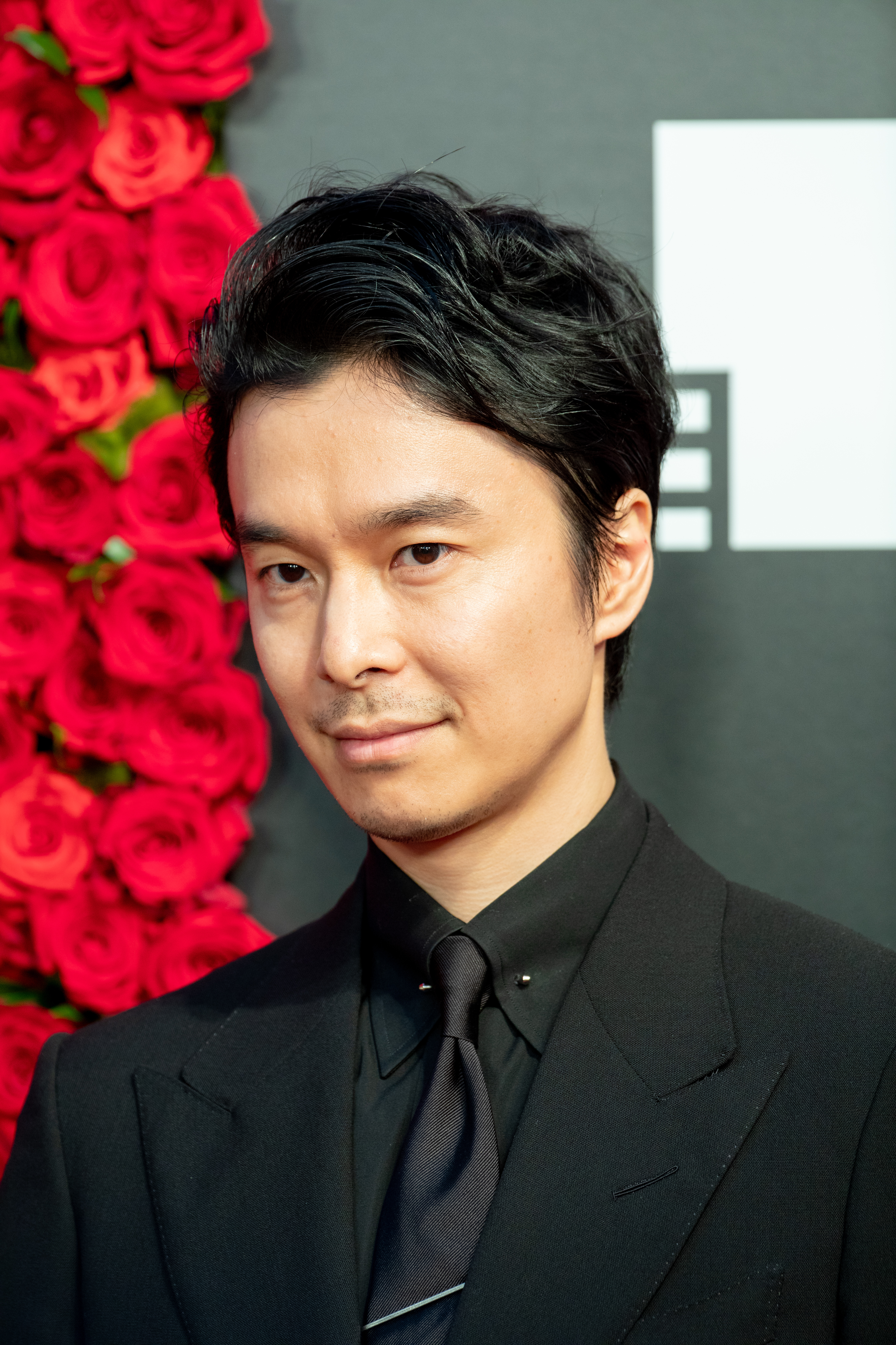 第30回 東京国際映画祭 オープニングセレモニー 長谷川博己 (碧朱)